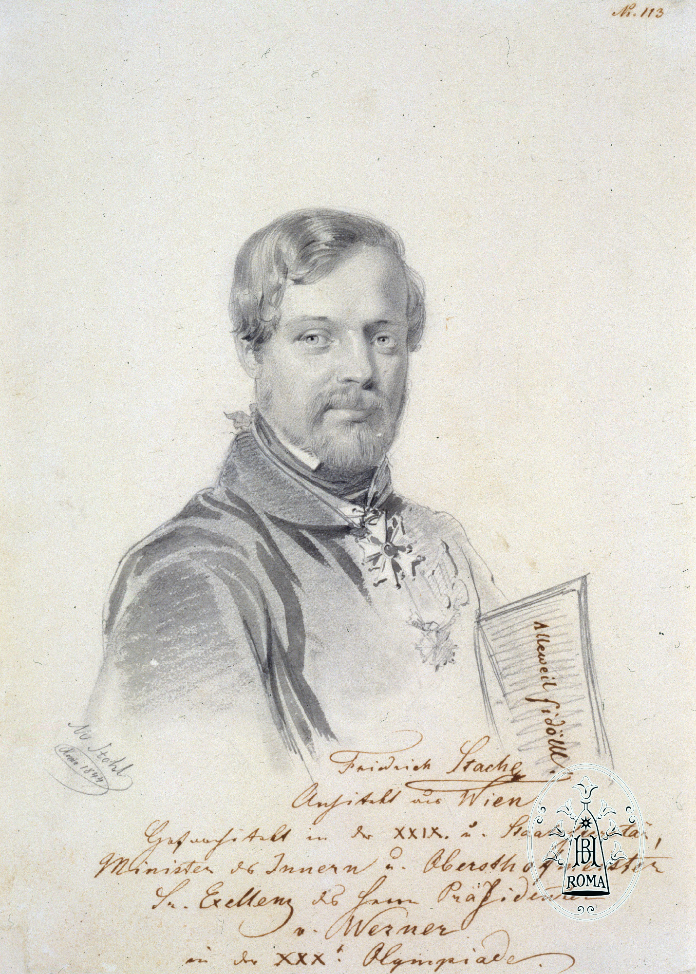 Porträt Friedrich August Ritter von Stache (Ponte-Molle-Gesellschaft mit Position im Cervaro-Fest in der XXIX. und XXX. Olympiade), gezeichnet von Michael Stohl, Rom 1844